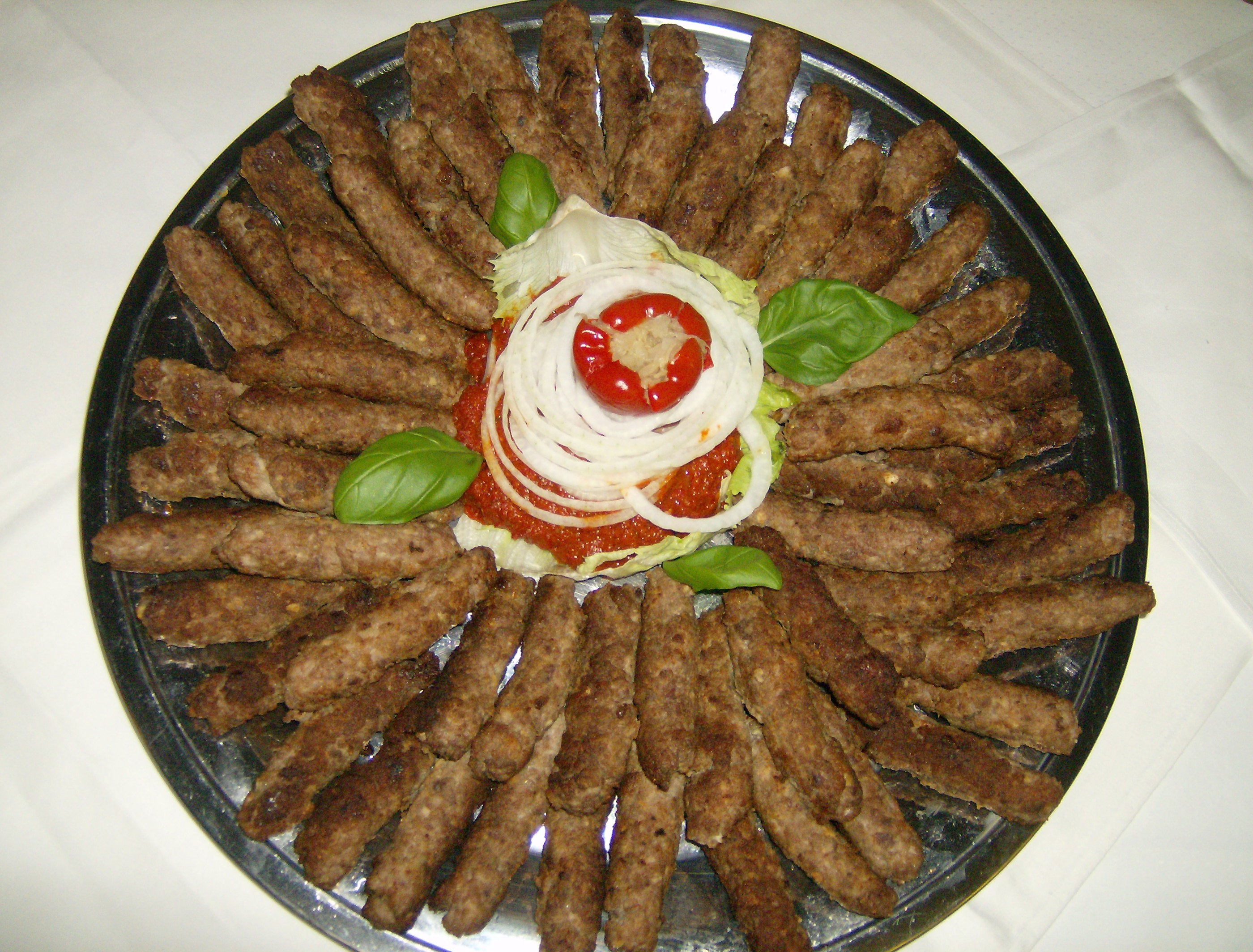 Cevapcici-Platte